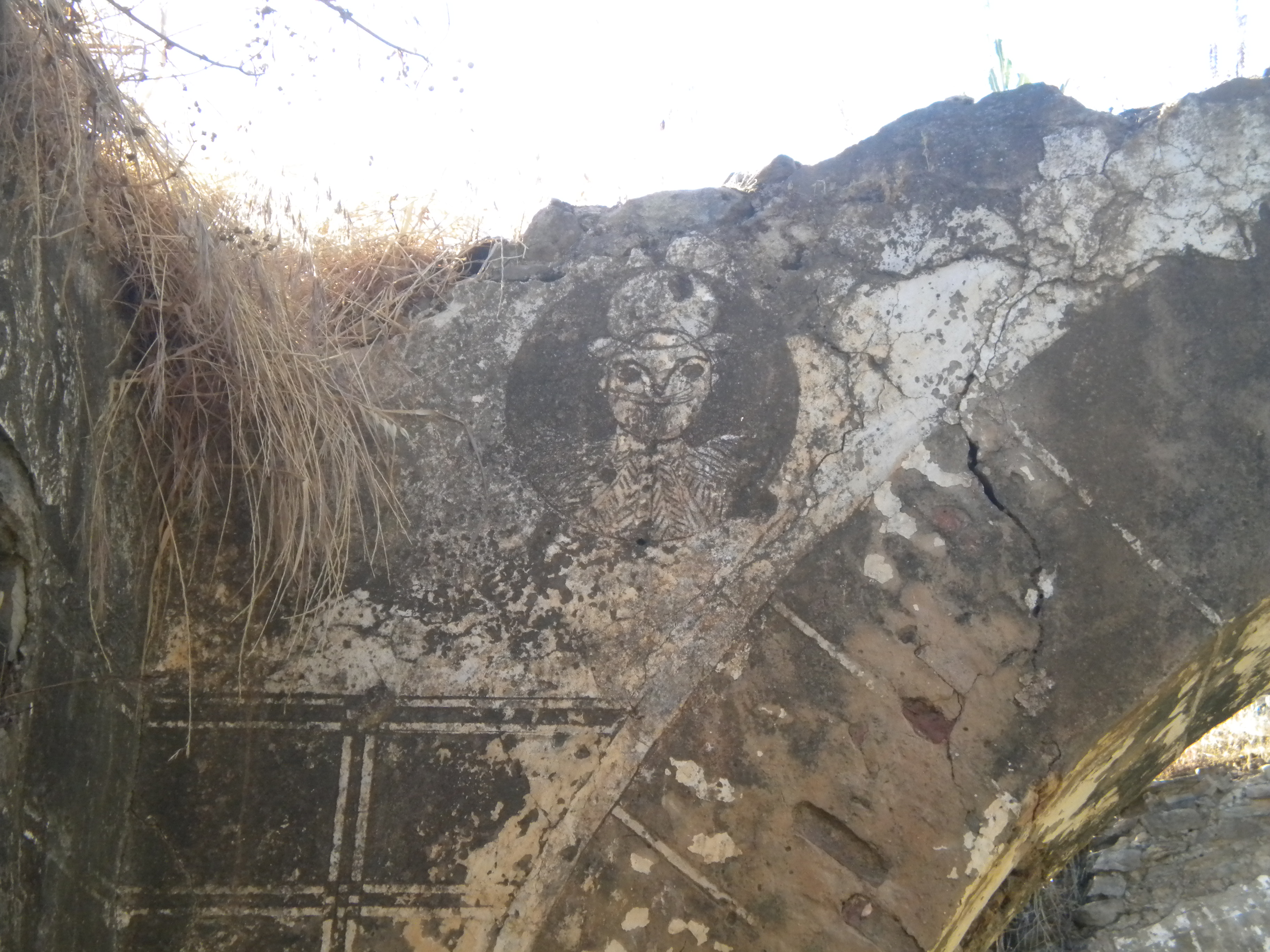 Figura en esgrafiado en los muros de la ermita del Santo Cristo de Talaván (Extremadura, España)